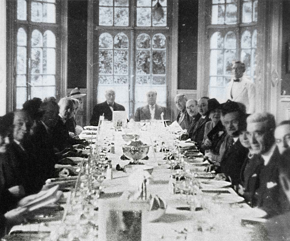 archives Curnonsjy éditée par Jeanne B Barondeau 2007